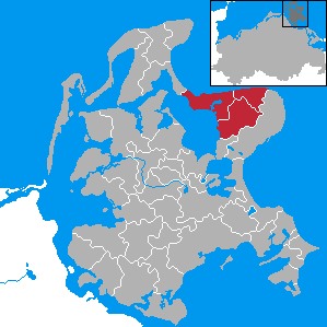 Amt Jasmund, Landkreis Rügen, Mecklenburg-Vorpommern